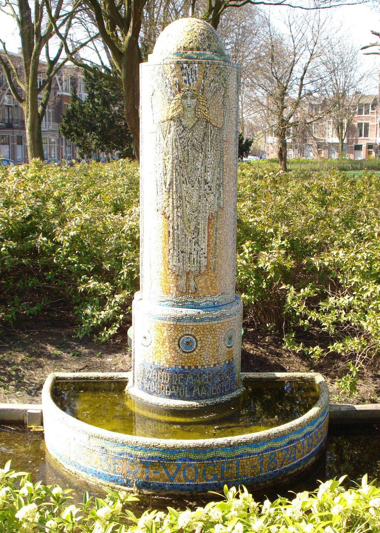 Den Haag, Frederik Hendrikplein. Monument "Albert Vogel sr." van A.J. Molkenboer. The Hague/The Netherlands.